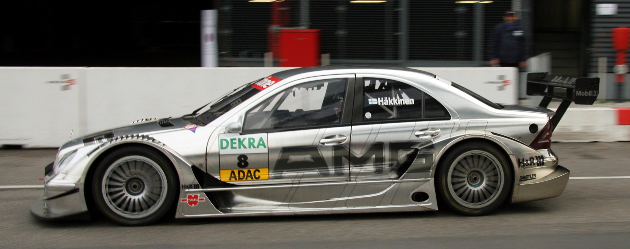 DTM car Mercedes-Benz AMG 2006 (C-Class, W203), Mika Häkkinen (driver)